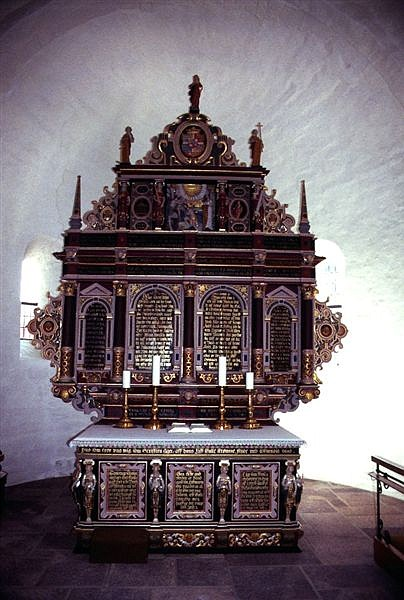 Aa Kirke på Bornholm